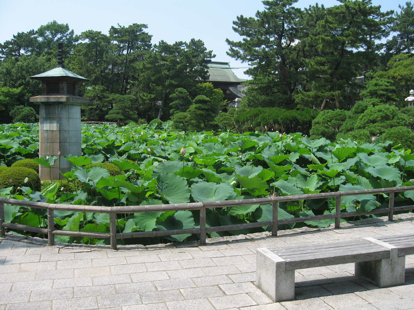 新潟県新潟市中央区。白山公園の写真。